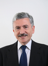 Foto del deputato Massimo D'Alema - XVI legislatura